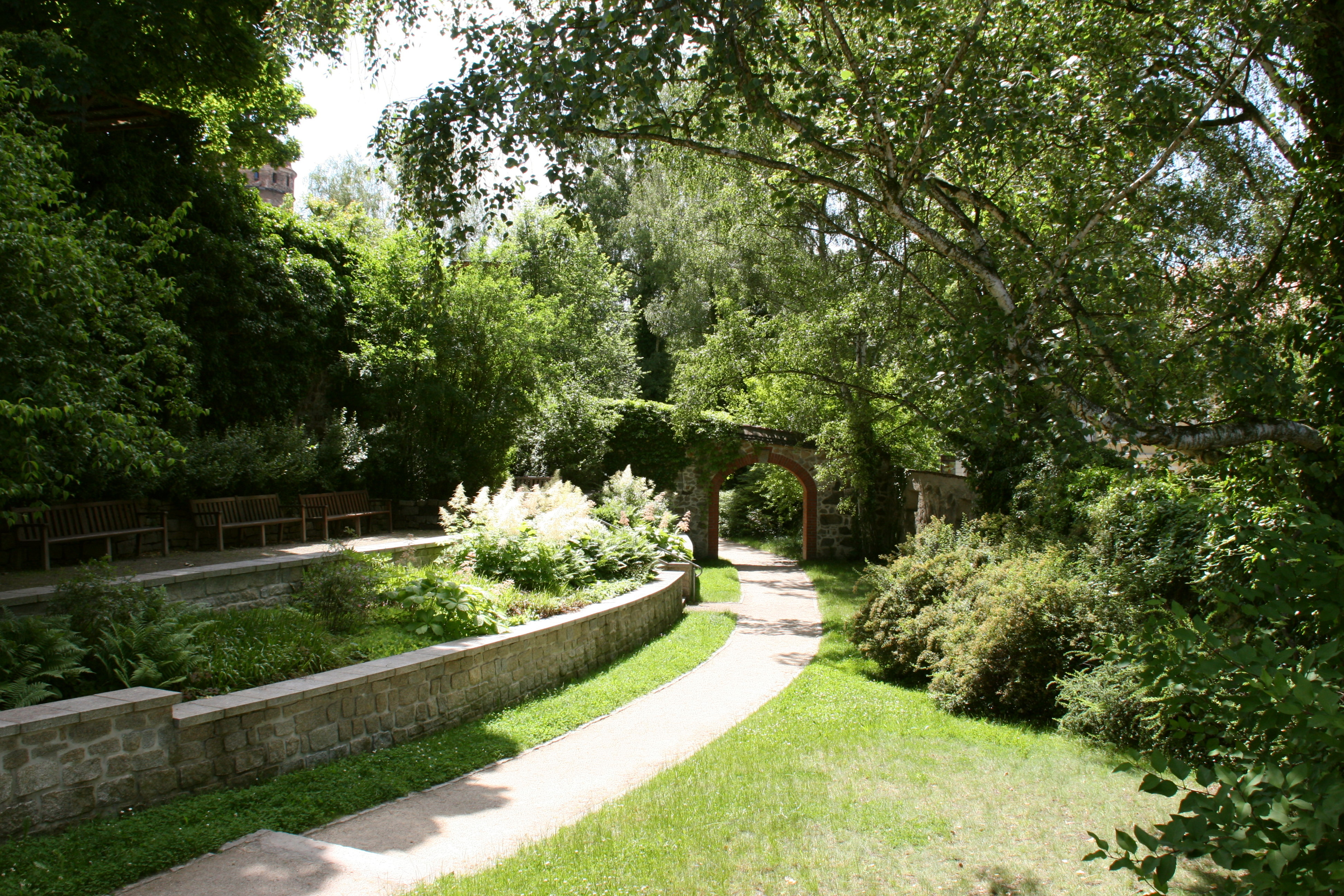 Nikolaizwinger in Görlitz